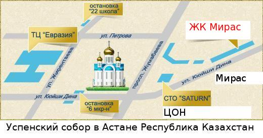 Успенский собор Астаны фото4